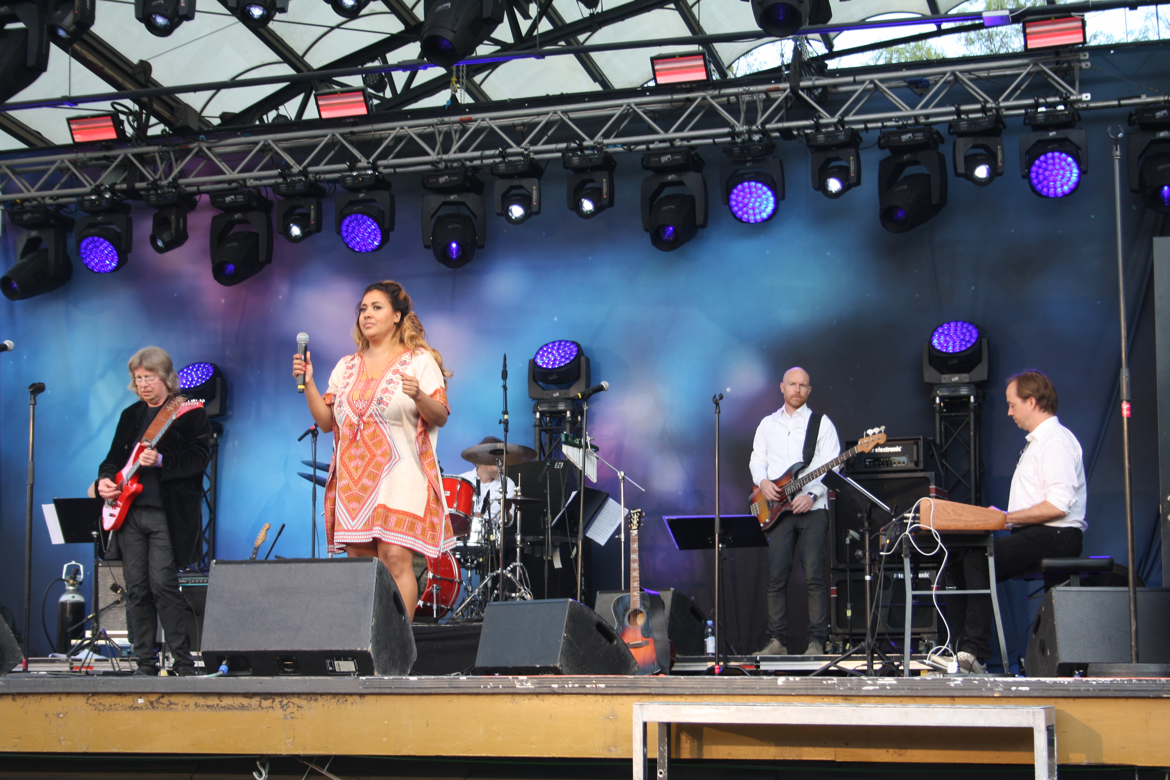 Hyllningskonserten Sol Vind och Vatten under Eurovision i Kungsträdgården